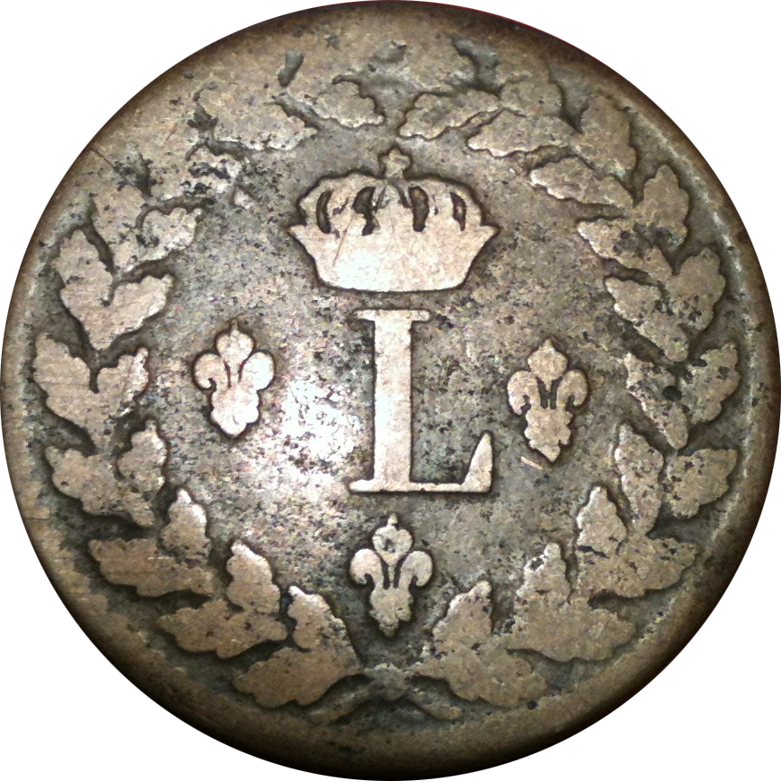 Avers d'une pièce de 1 décime Louis XVIII émise en 1815